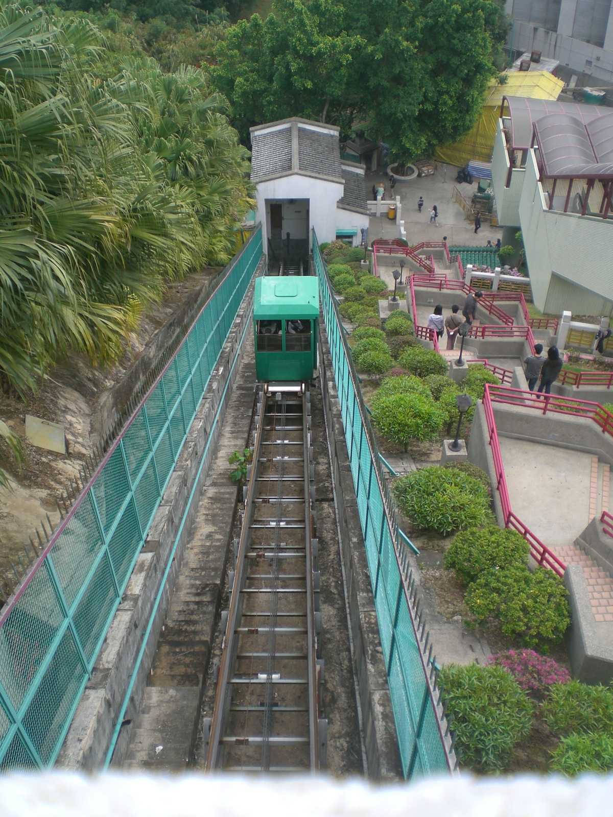 沙田寶福山園內環境